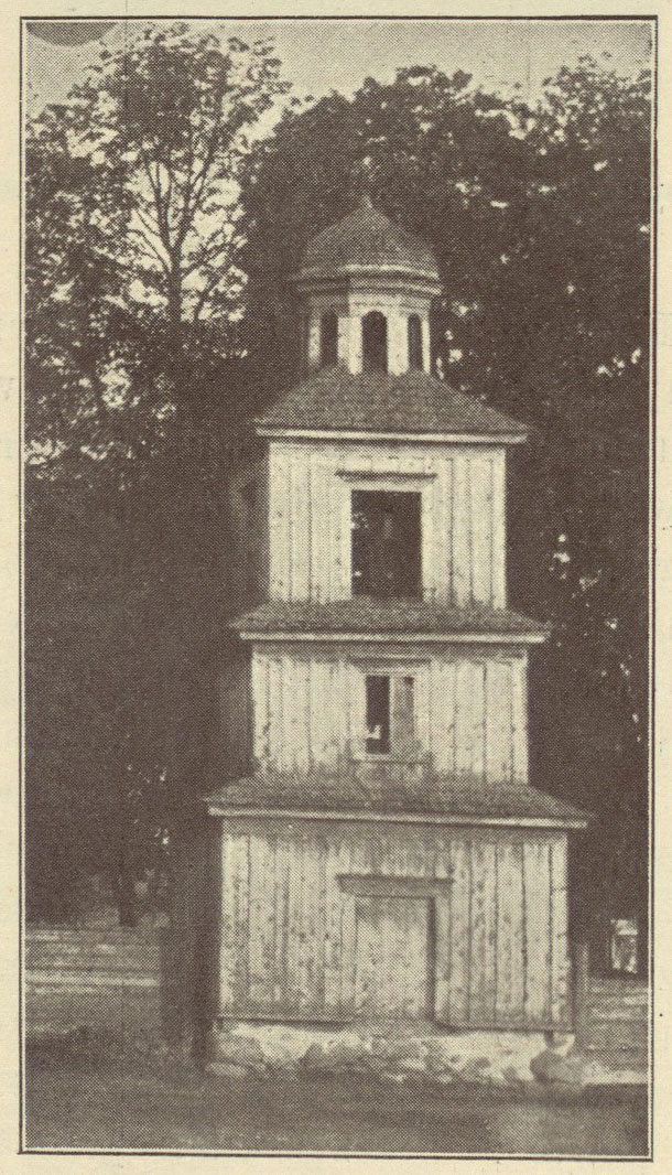 Беларуская (тарашкевіца): Докшыцы (Dokšycy), пляц Рынак (plac Rynak). Касьцёл, званіца